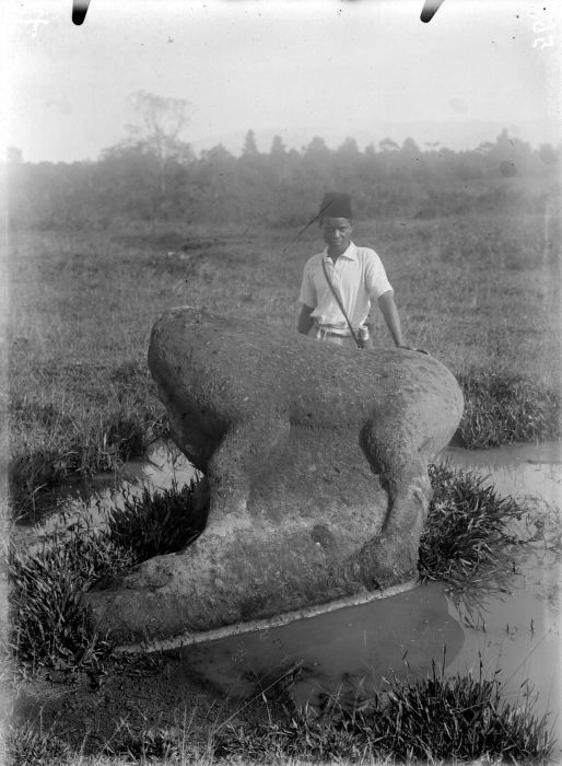 Negatief. Man poseert bij een megalitisch beeld te Geramat